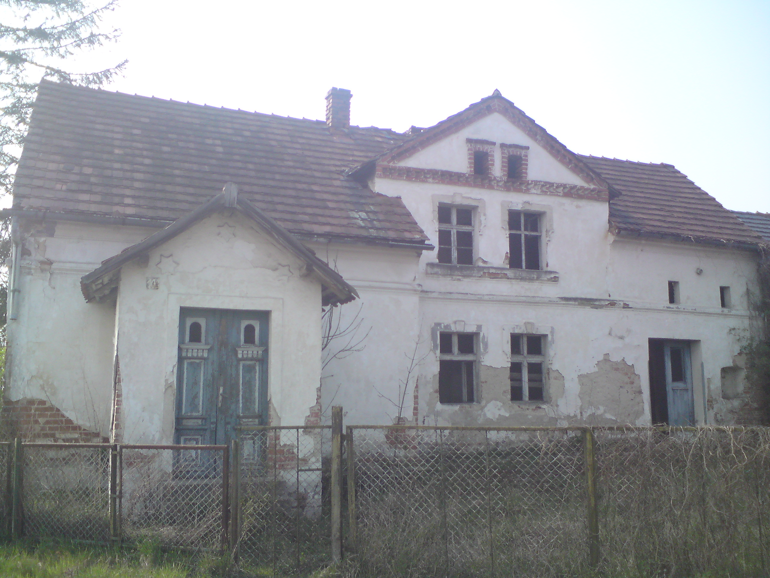 Murowana lałba z dwuspadowym dachem. Nad drzwiami znajdują się trzy ozdobne sześcioramienne gwiazdy.